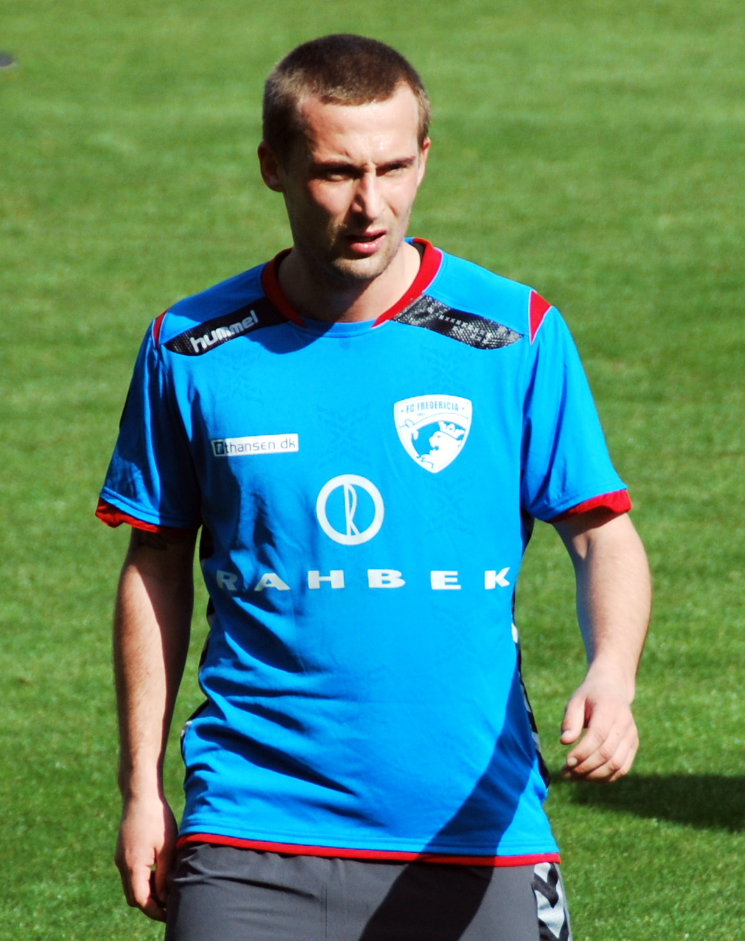 Fodboldspilleren Morten Friis fra FC Fredericia. Her i en testkamp mod Viborg FF på Viborg Stadion.